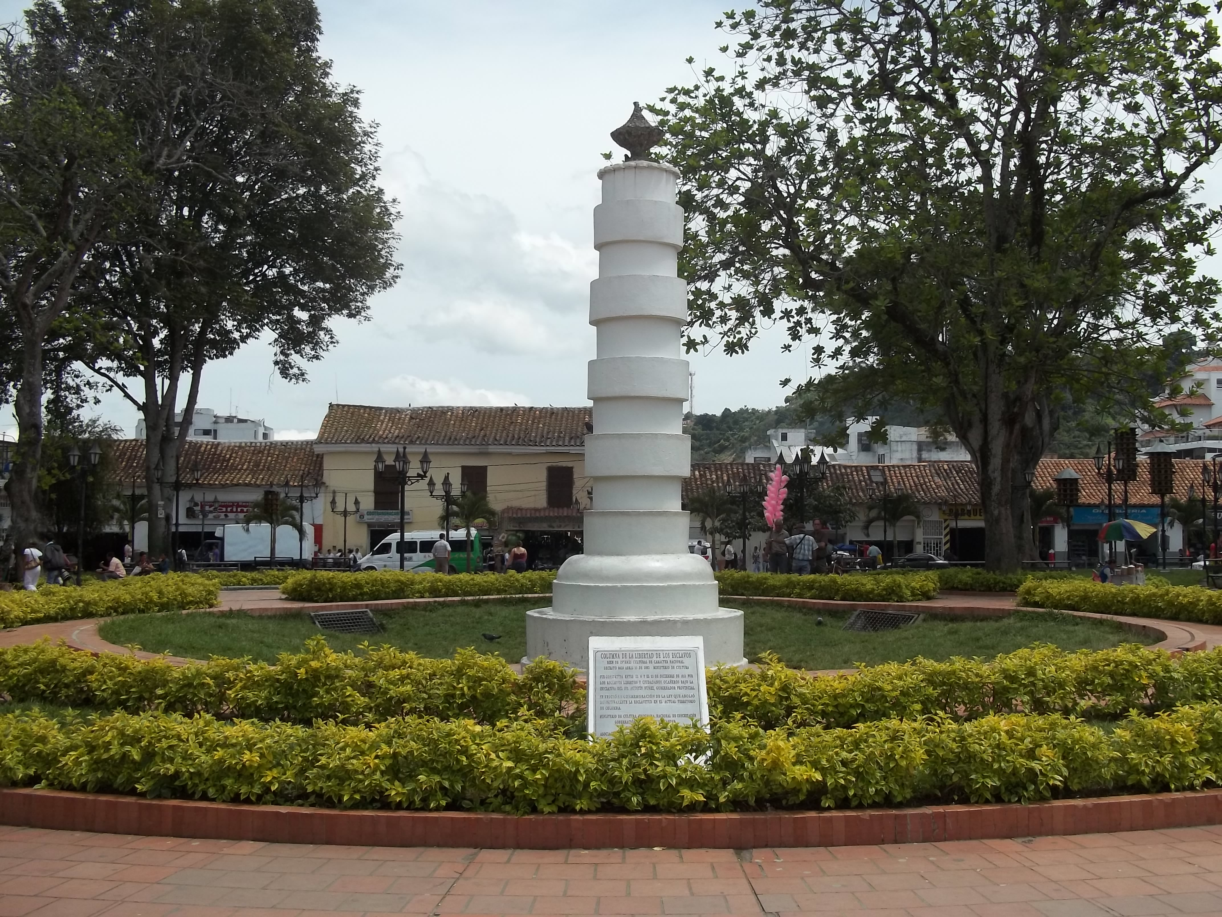 La meca central de la ciudad adornada con el altar en memoria de una época de esclavitud.